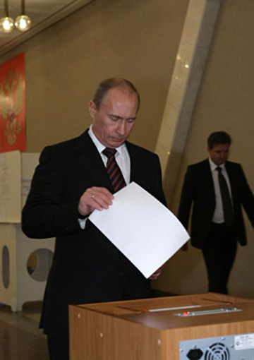 Владимир Путин голосует на выборах в Московскую городскую думу V созыва